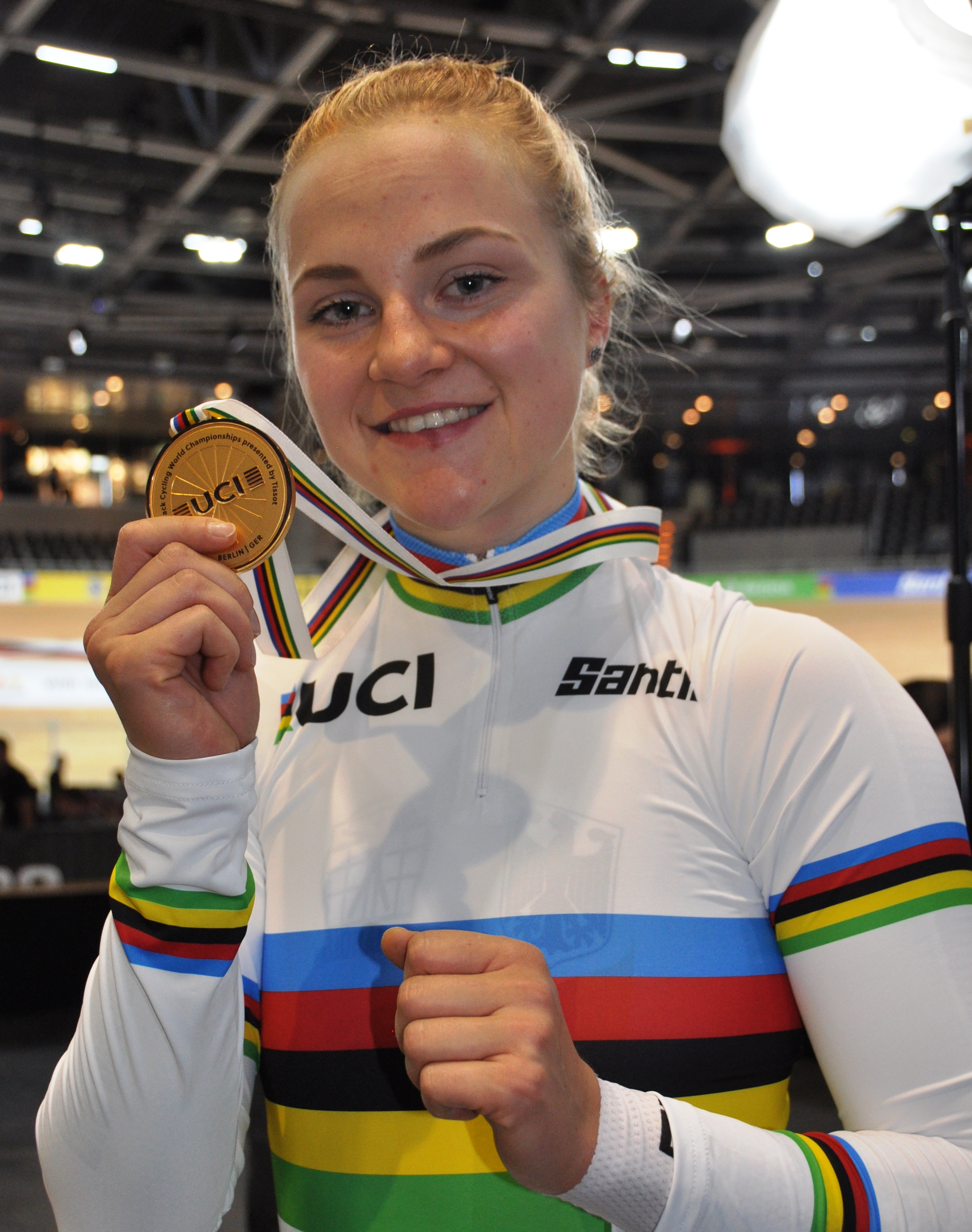 Lea Sophie Friedrich, deutsche Radsportlerin